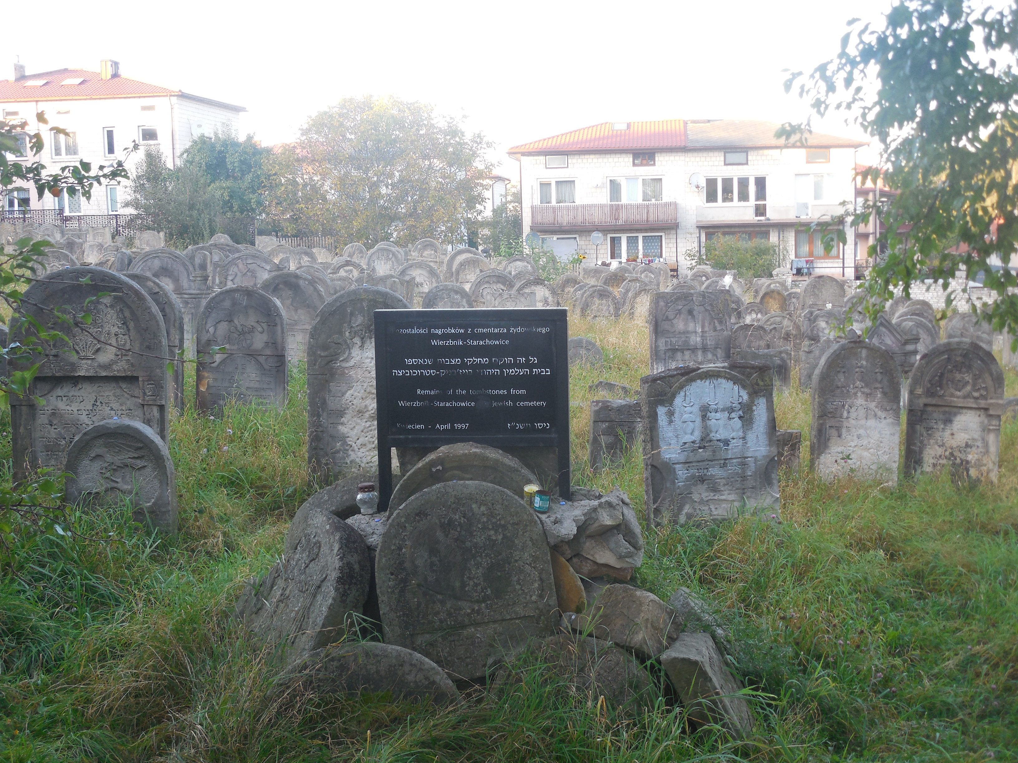 Starachowice, cmentarz żydowski, kon. XIX w.